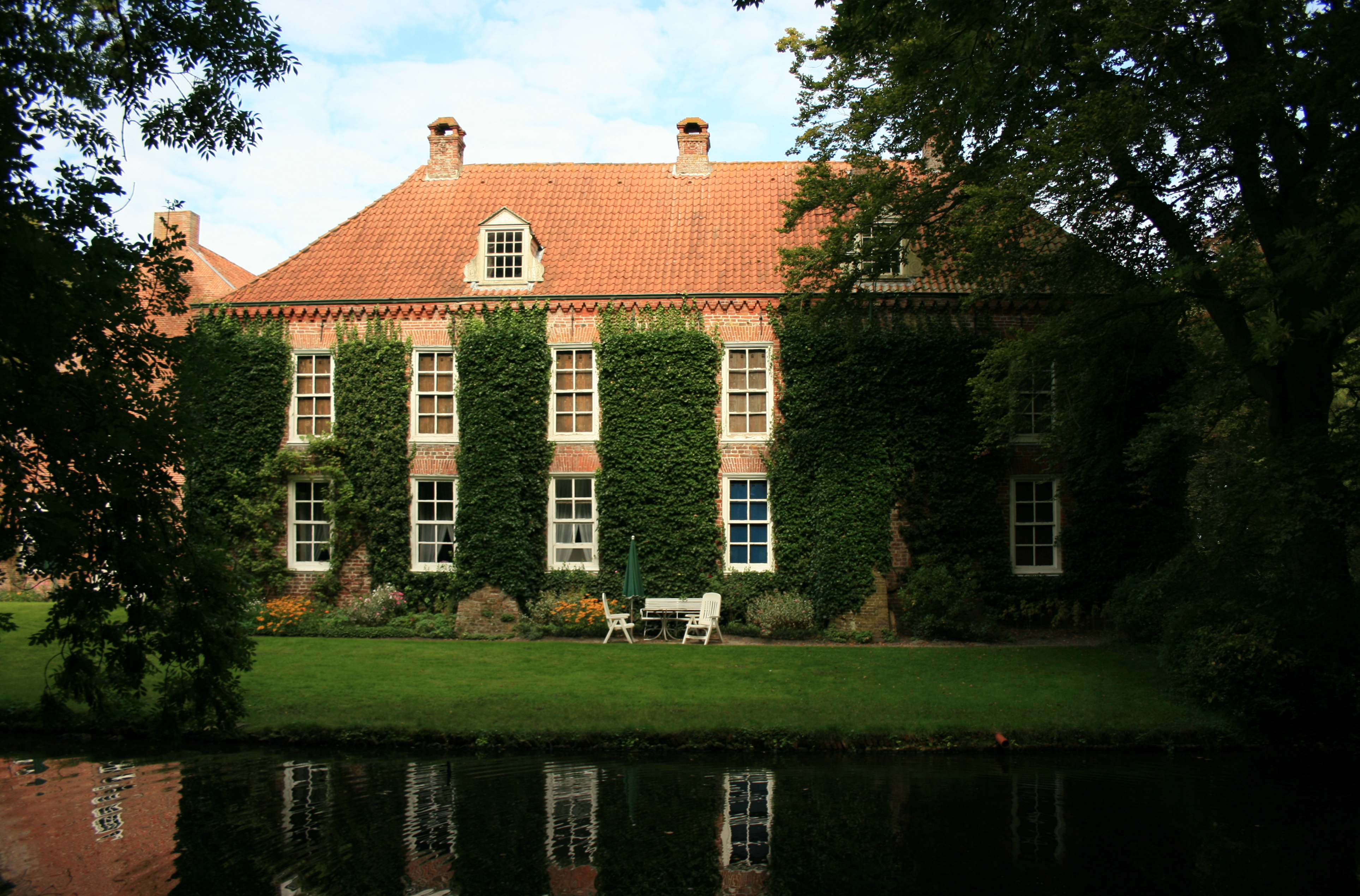 Rückansicht der Osterburg in Groothusen